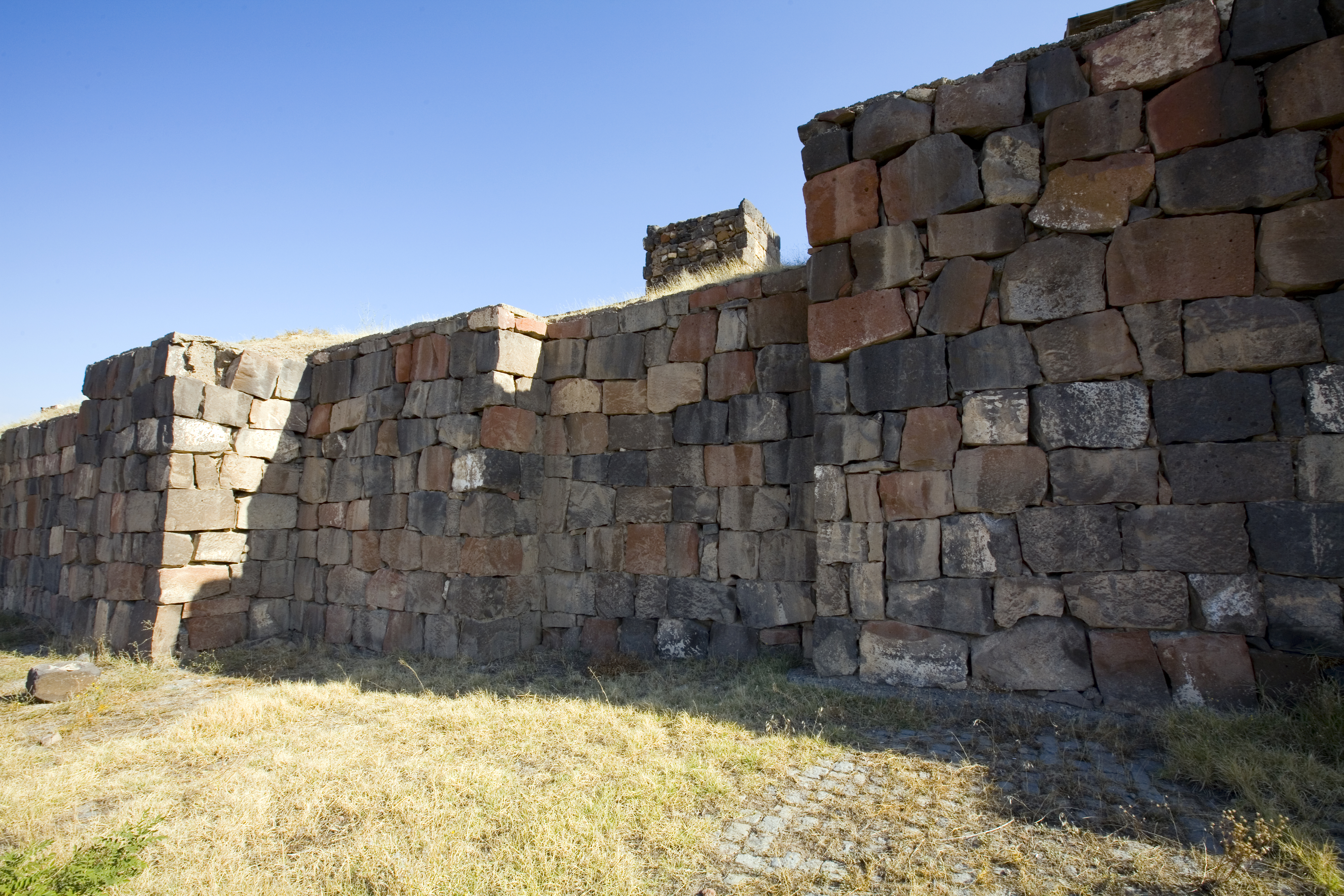 Erebuni wall